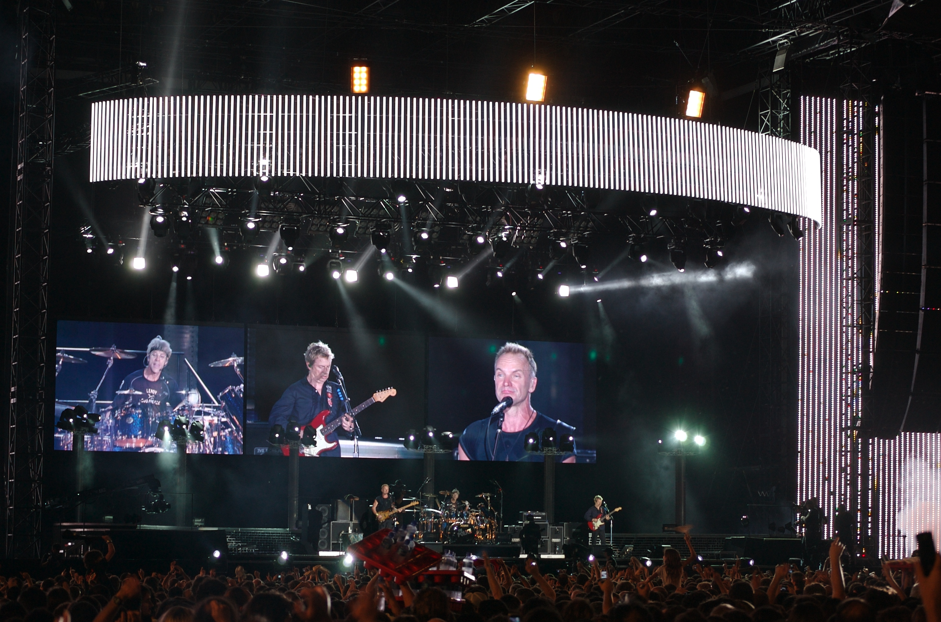 The Police Reunion Tour 2007. Estadio Monumental, Buenos Aires, Argentina.